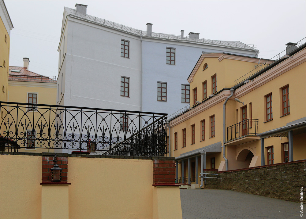 Старая забудова ў цэнтры Мінска